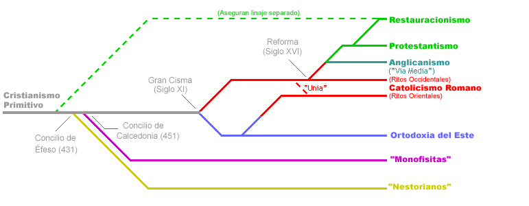 Archivo tomado de Commons (Christian-lineage.png) versión en inglés y traducido al español bajo la misma licencia.